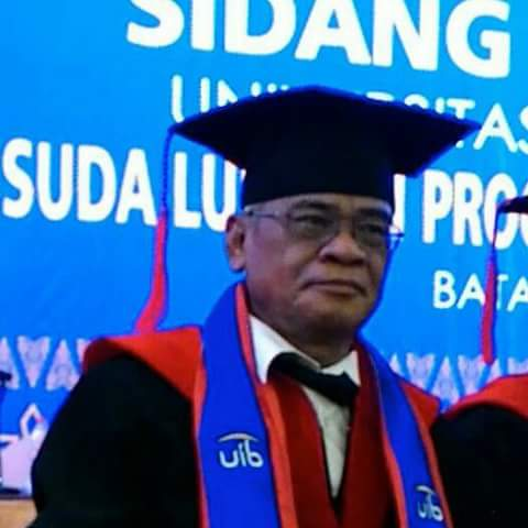 Rumbadi Dalle (lahir di Prabumulih, 13 Nopember 1956; umur 64 tahun dan wafat 01 Januari 2019), adalah seorang penulis dan wartawan yang pernah eksis di dunia jurnalistik medio 1990 hingga 2017. Bagi kalangan jurnalistik, politisi, pengusaha dan akademisi di Provinsi Kepulauan Riau, Rumbadi Dalle dikenal mudah bergaul dan idealis dalam menjalankan profesinya sebagai wartawan.